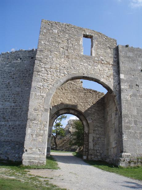 Hainburg hradná brána